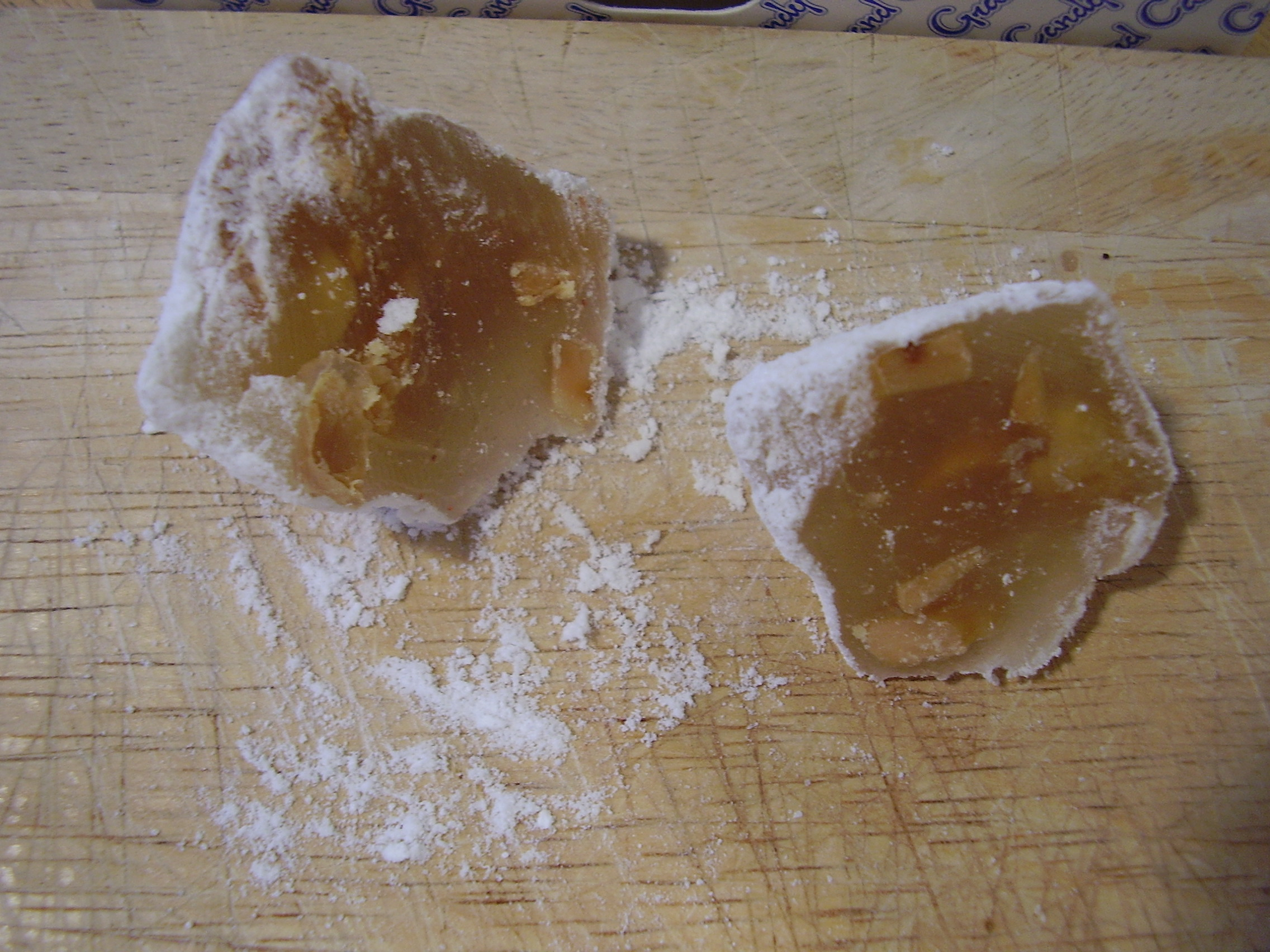 Lokum (Rachat-Lukum) from Armenia